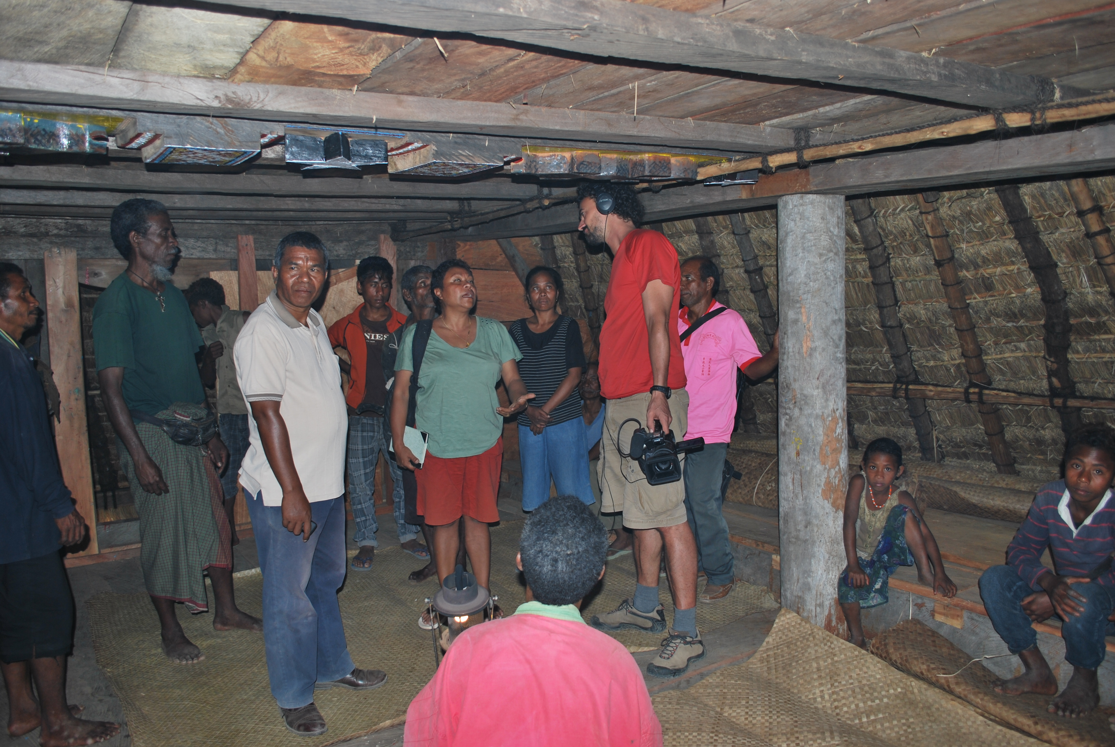 In einem Heiligen Haus (Uma Lulik) in Fatuc Laran, Lactos, Cova Lima, Osttimor